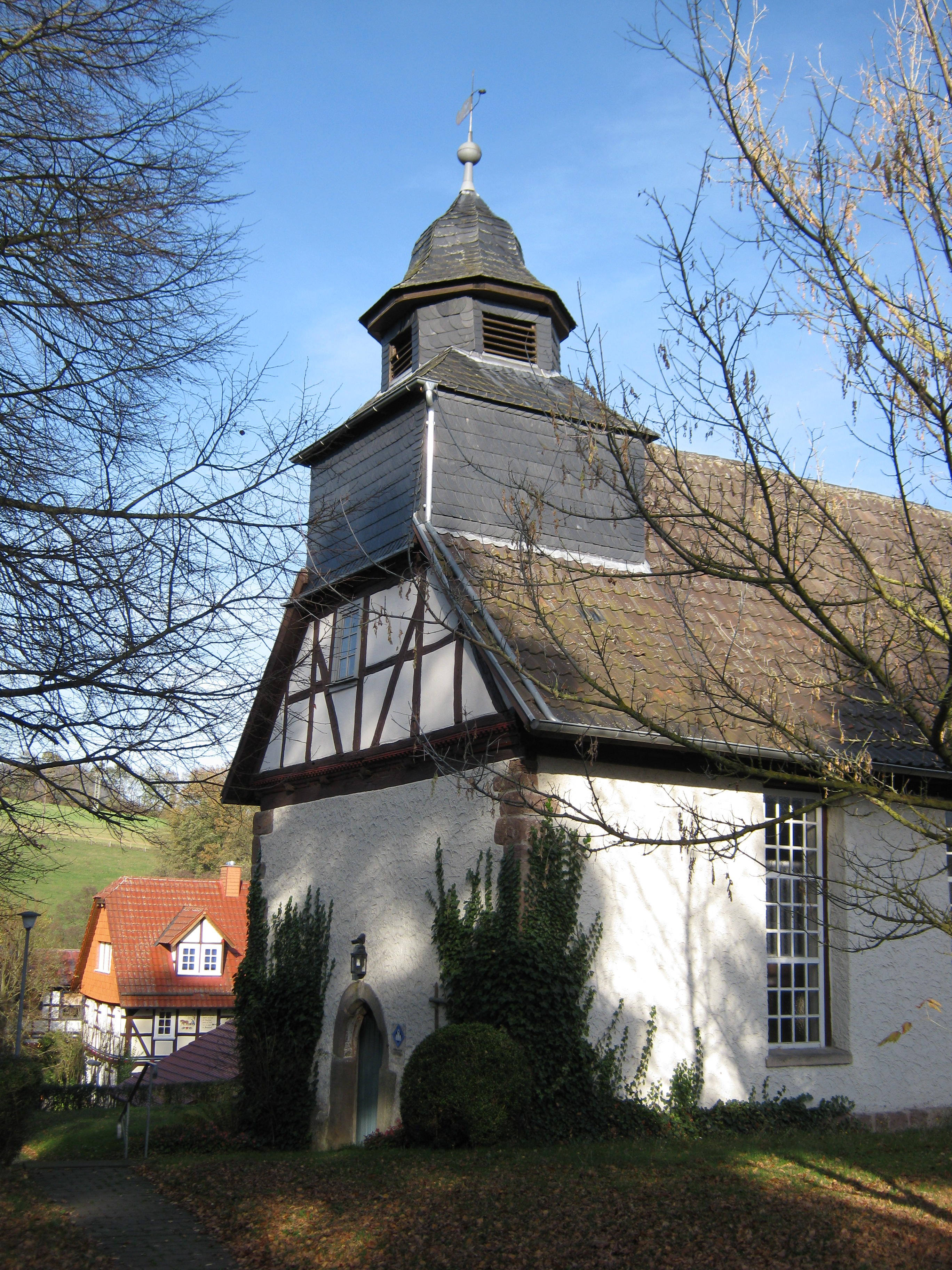 Kirche Breitzbach (Hessen), Adresse: Sperlingsberg 2, 37293 Herleshausen OT Breitzbach